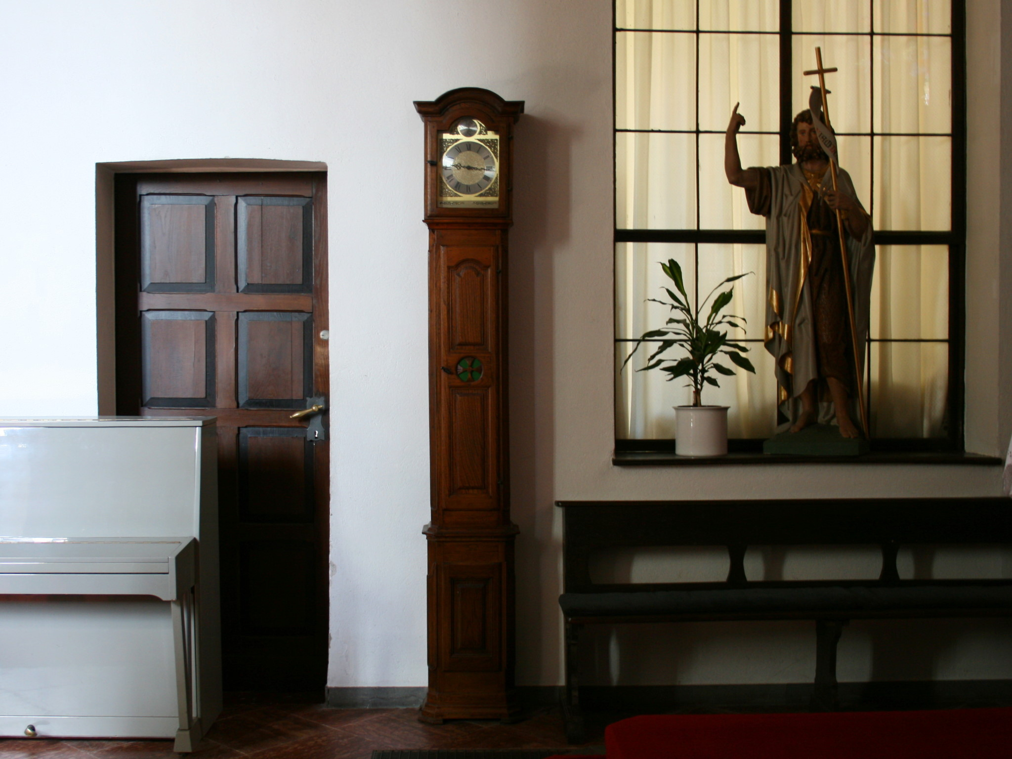 Sankt Johann Baptist in Marienheide-Gimborn